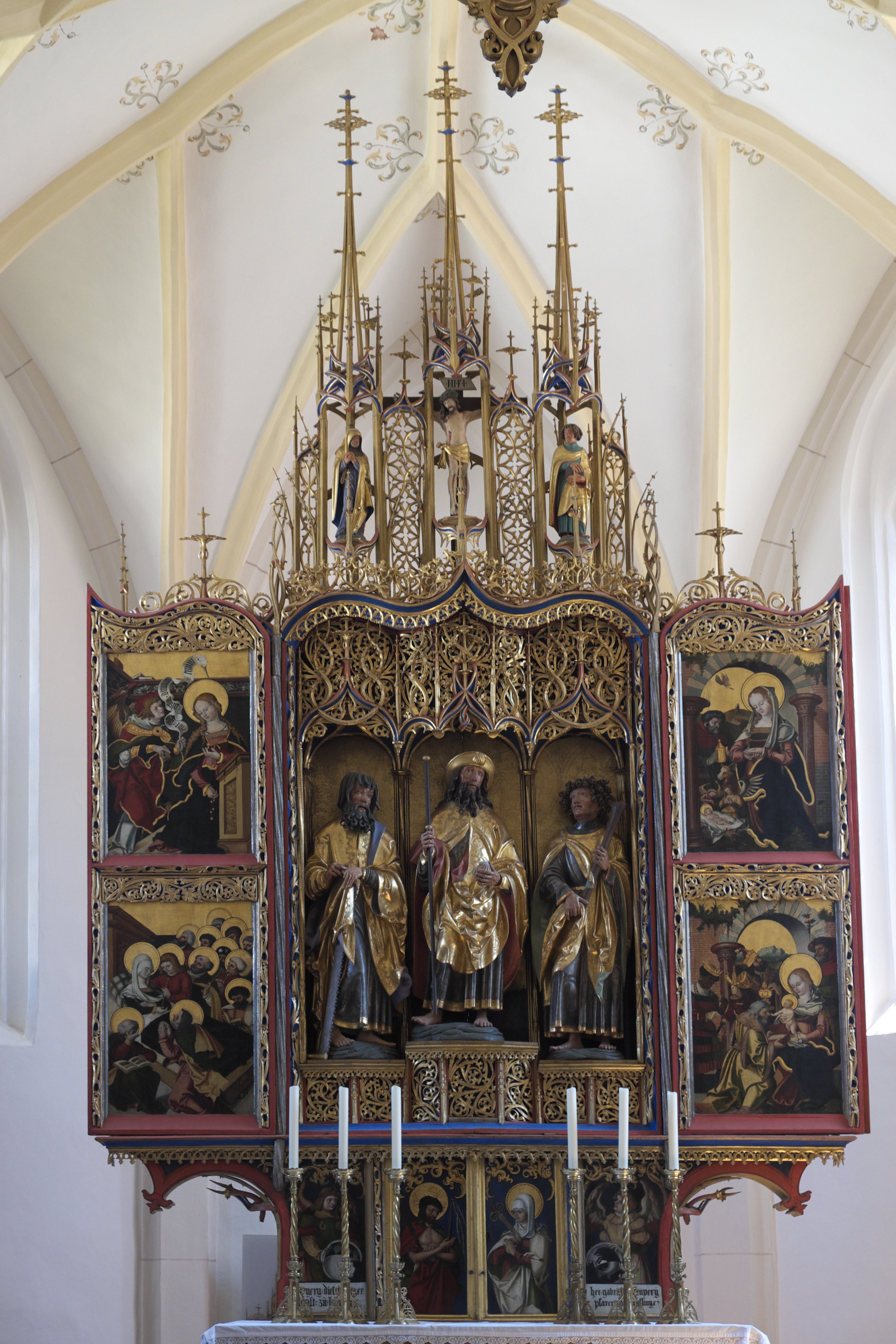 Katholische Filialkirche St. Jakobus der Ältere in Rabenden, einem Ortsteil von Altenmarkt an der Alz im Landkreis Traunstein (Bayern/Deutschland), Altar des Meisters von Rabenden, spätgotischer Flügelaltar